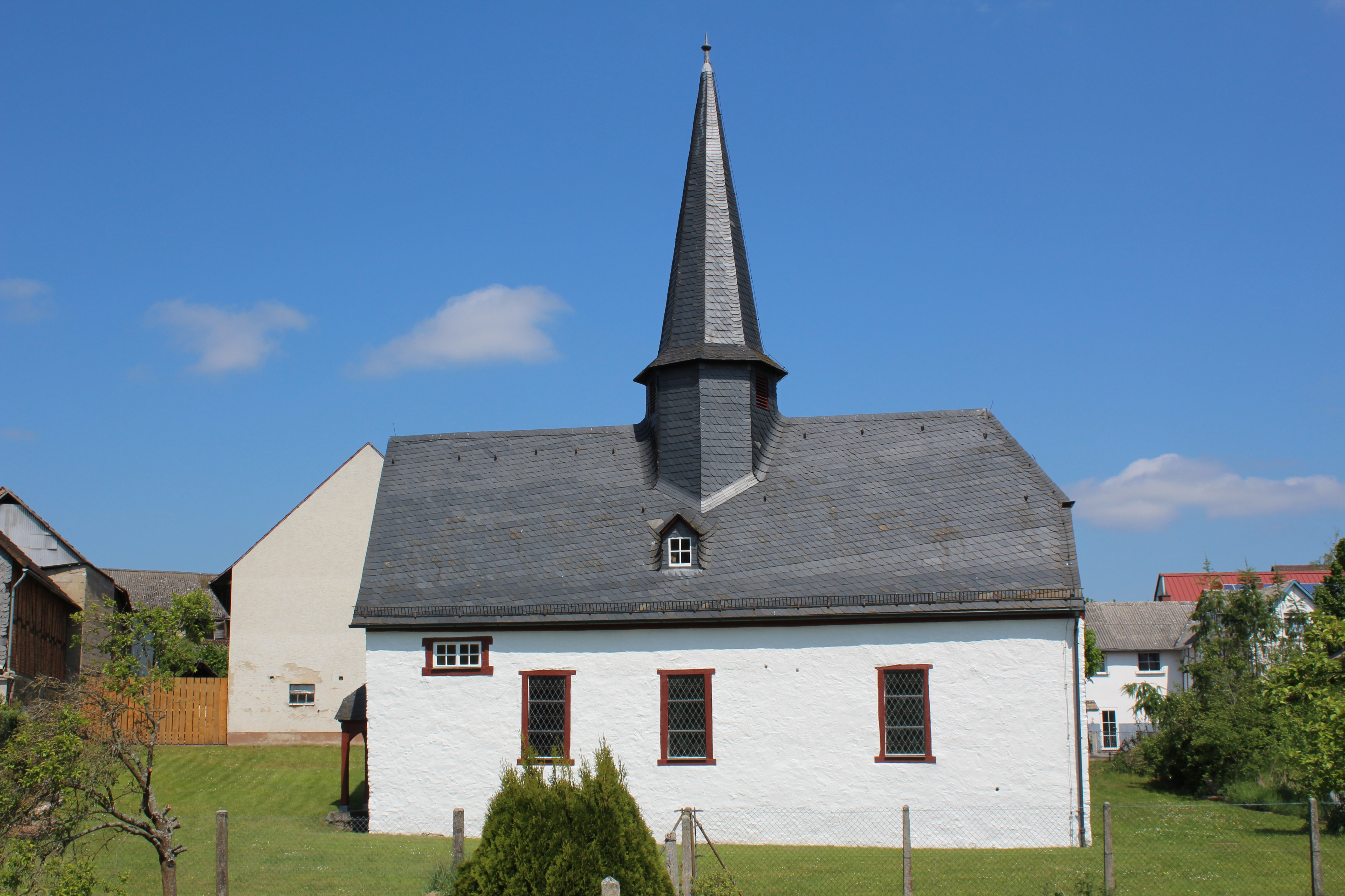 Alte Kirche Volpertshausen, Gemeinde Hüttenberg, Lahn-Dill-Kreis, Hessen, Deutschland